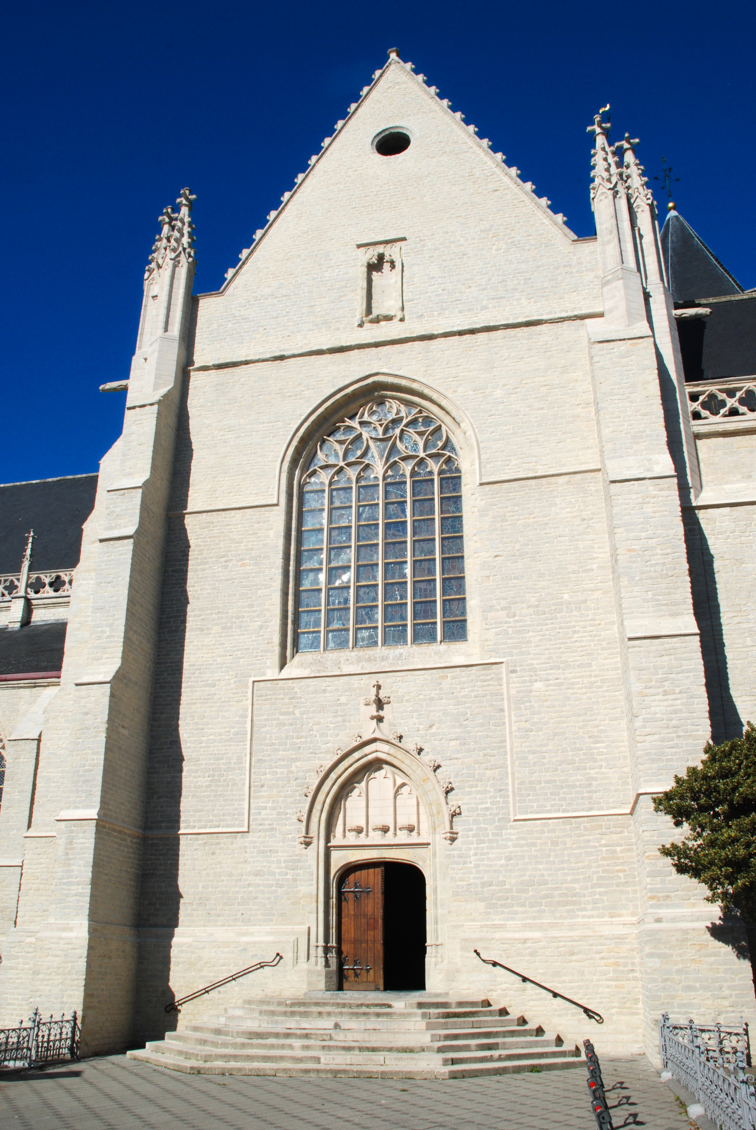 Belgique - Brabant flamand - Vilvorde - Église Notre-Dame de Bonne-Espérance